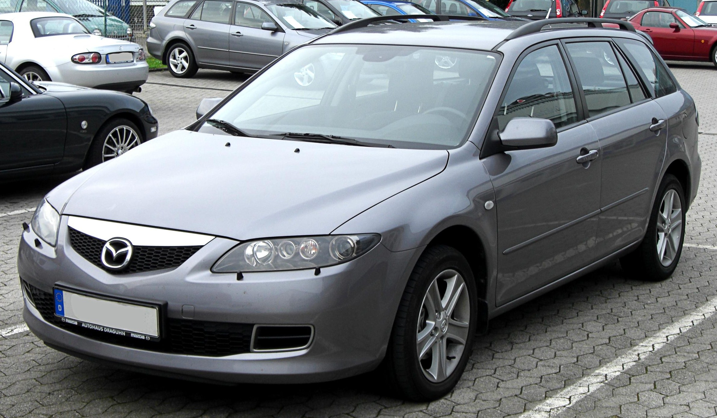 Mazda 6 Sport-Kombi